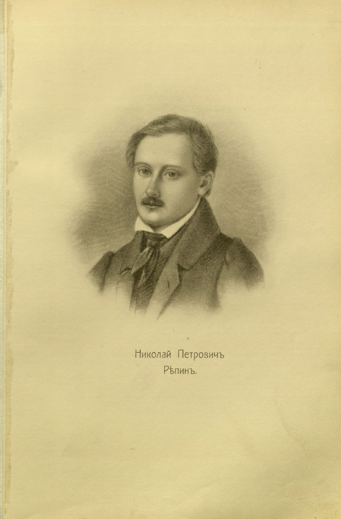 Репин, Николай Петрович